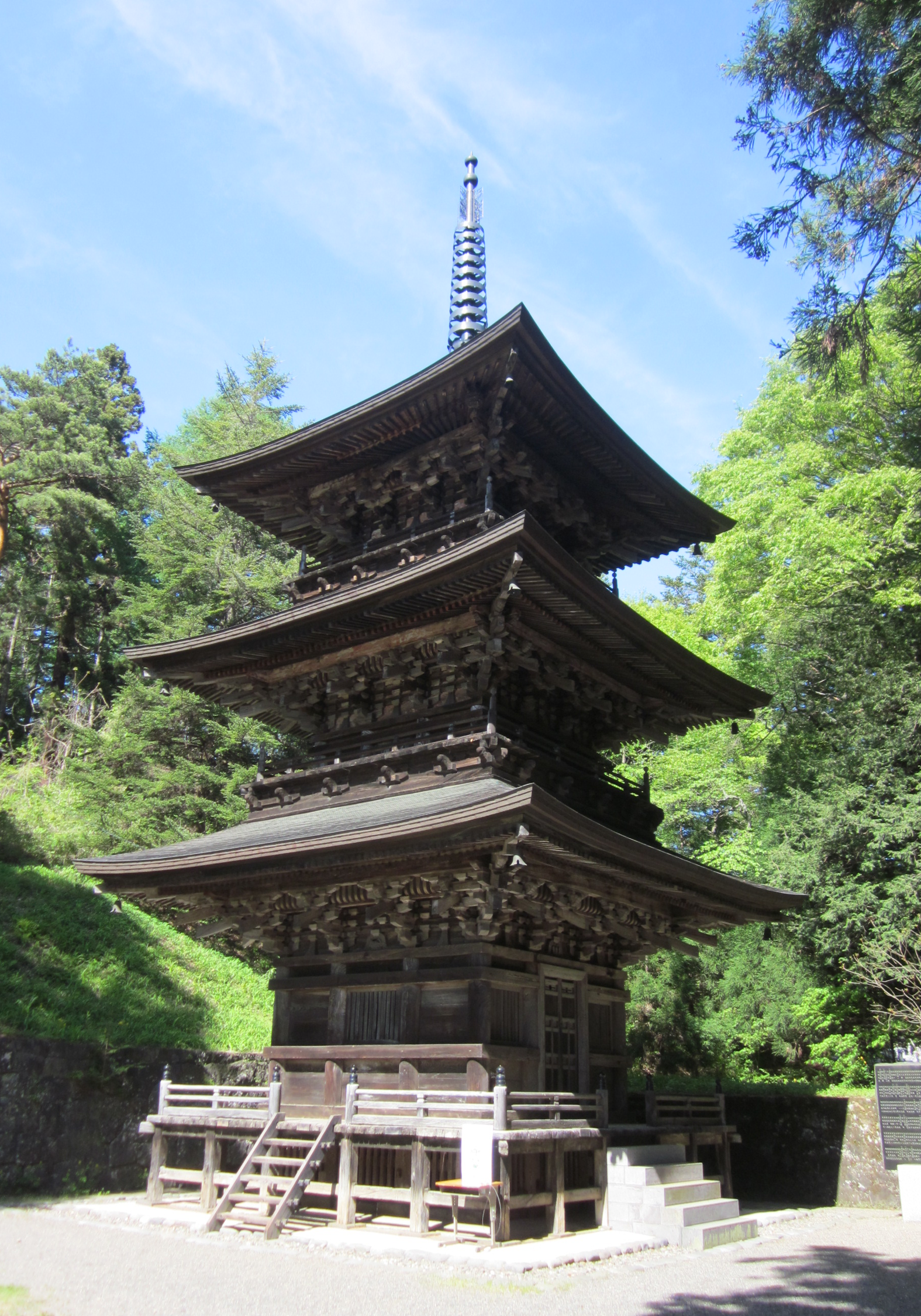 真楽寺（北佐久郡御代田町）の三重塔